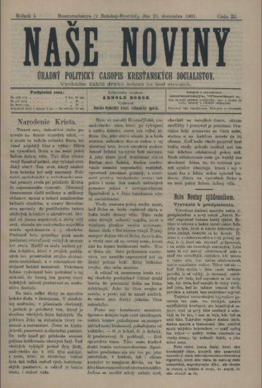 Titulný list periodika Naše noviny z r. 1907